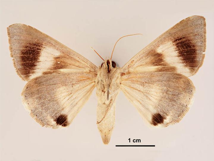 Achaea argilla male, ventral view